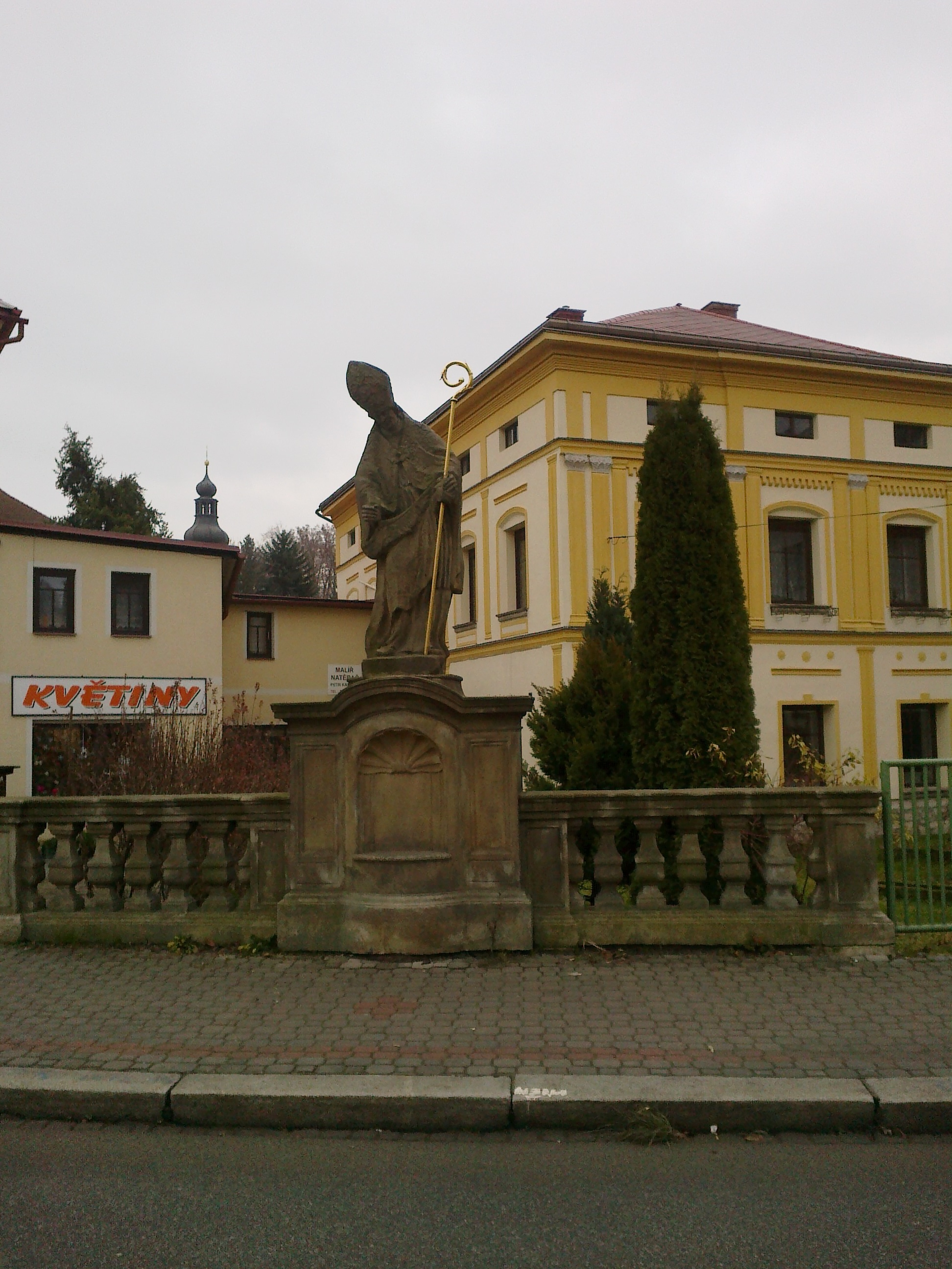 Police nad Metují - socha sv. Prokopa